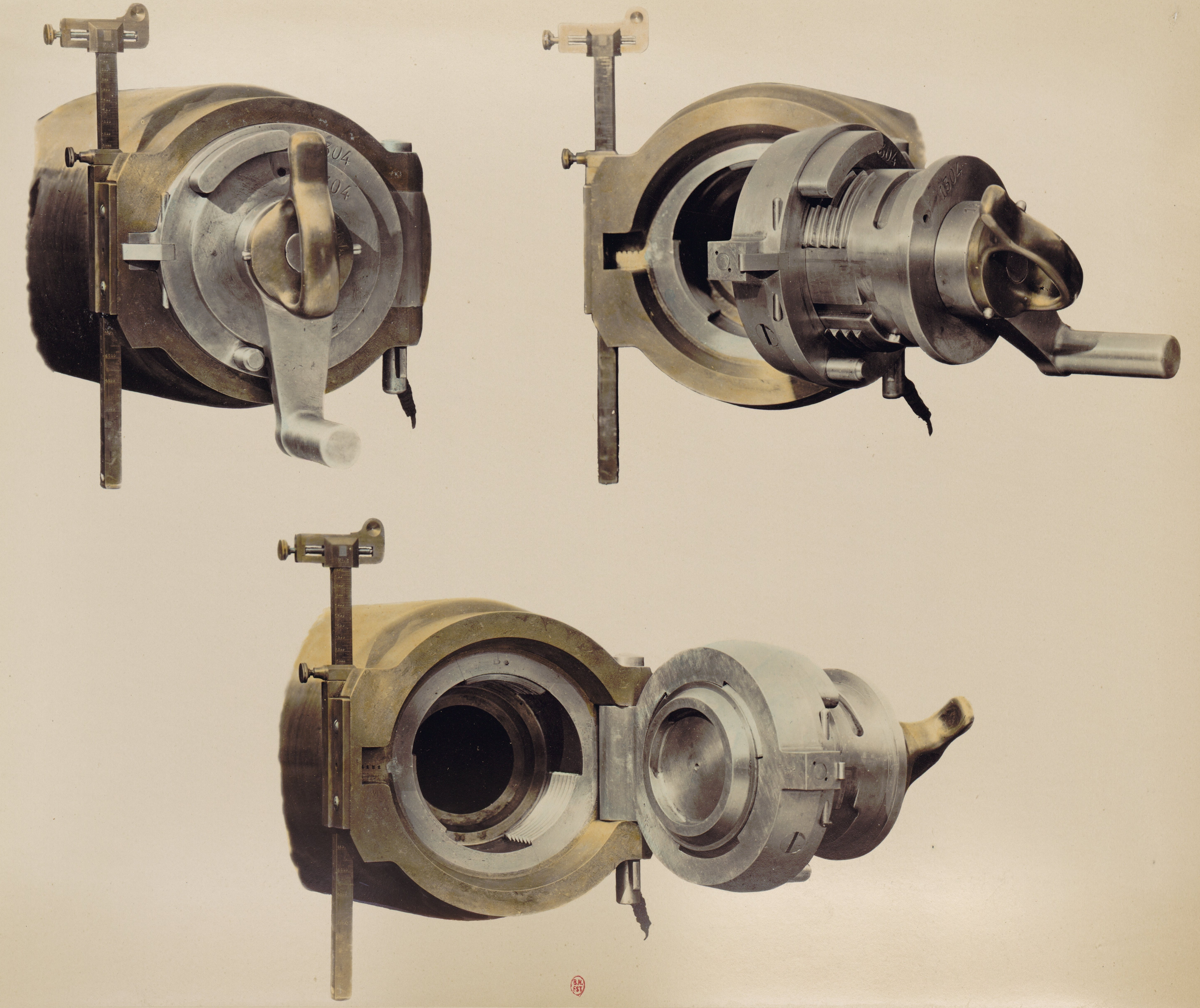 Matériel de l'artillerie et des équipages militaires : culasse du canon de 5 rayé de campagne.